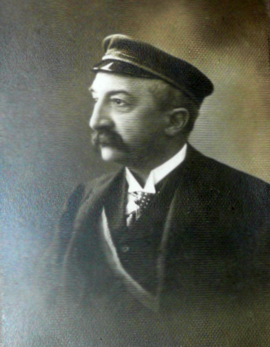 Milan Savić (1845-1930), Schriftsteller und Übersetzer (übersetzte als Erster Goethes Faust ins Serbische)